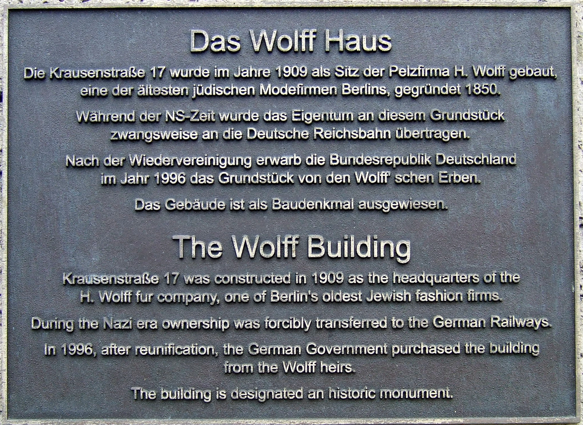 Wolff-Haus, Berlin. Abgebildet: Gedenktafel Krausenstraße 17. Die Firma H. Wolff in Berlin war in ihrer Blütezeit neben der Pariser Firma Revillon Frères das größte Unternehmen der Pelzbranche auf dem europäischen Kontinent, gegründet von Heimann Wolff im Jahr 1850. Von dem Architekten Friedrich Kristeller ausgeführt entstand in den Jahren 1907 bis 1909 nach den Vorstellungen von Victor Wolff der Prachtbau für das Unternehmen H. Wolff auf dem Grundstück Krausenstraße 17/18 (heute 17), mit zwei großen Innenhöfen, bis Schützenstraße 65/66 (heute 64).